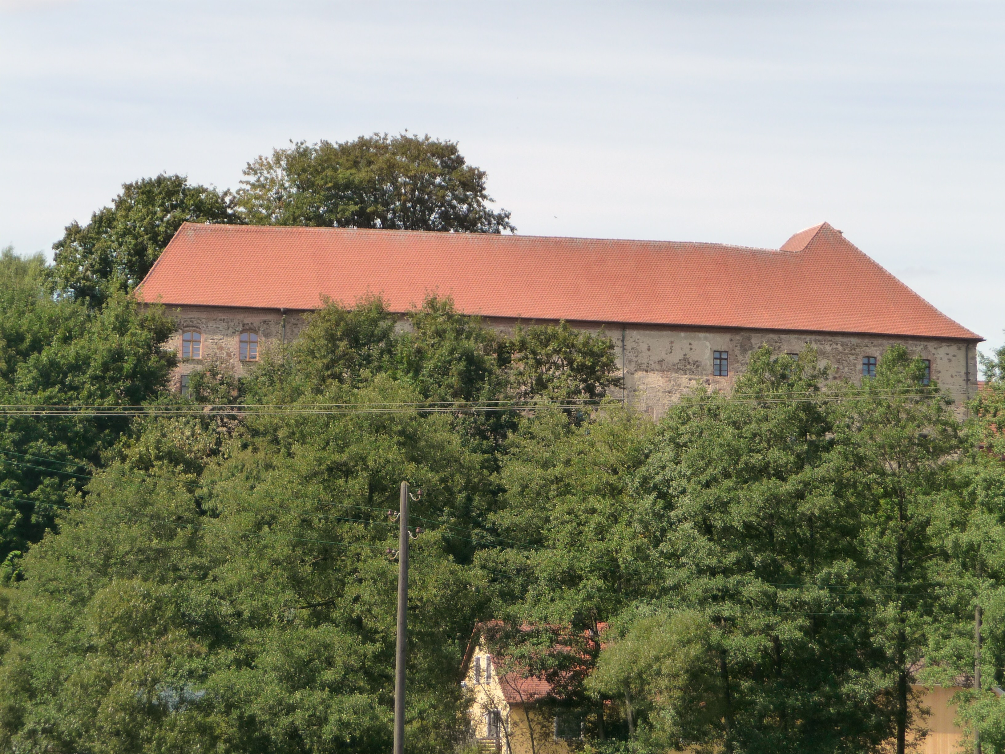 Schloss Burgtreswitz